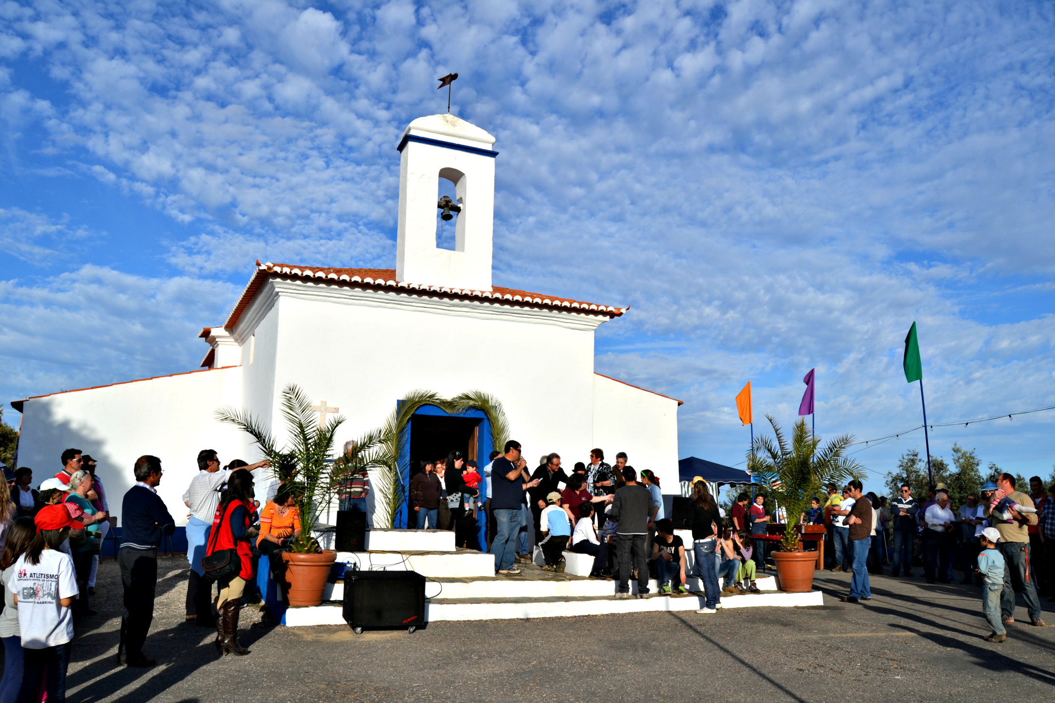 Igreja de Santa Bárbara em Borba, durante as romarias da Páscoa.